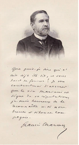 Portrait et fac similé d'autographe de Francis Charmes, écrivain, journaliste, directeur de la Revue des Deux-Mondes. Gravure vers 1890.